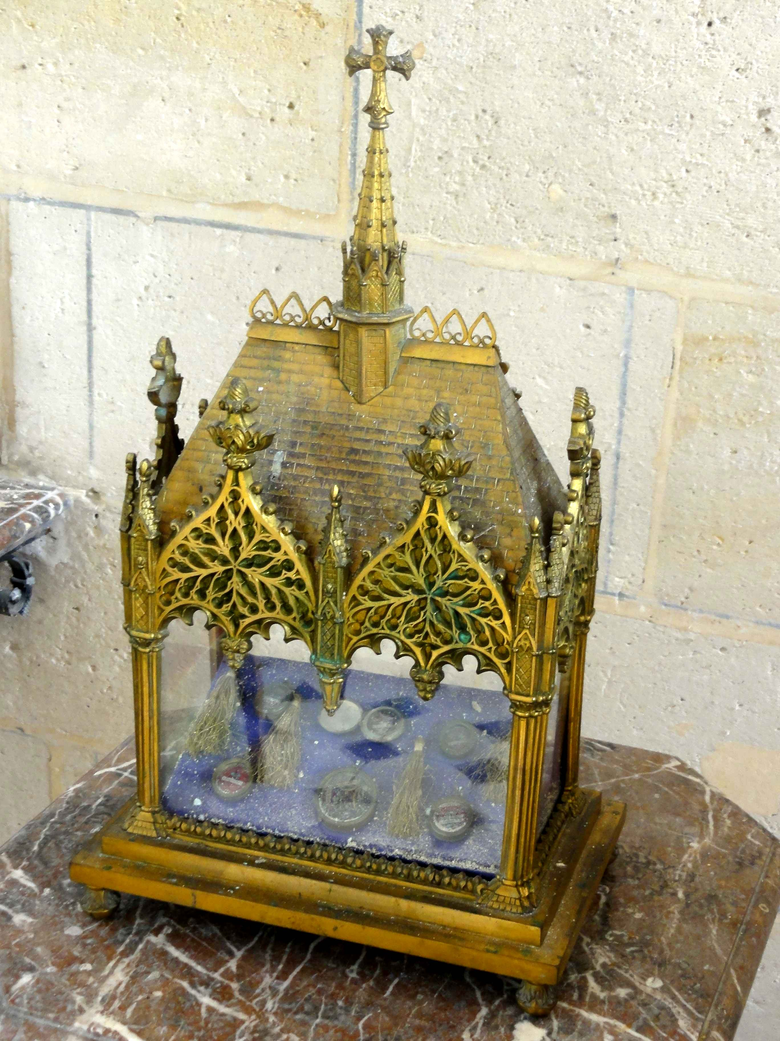 Mobilier de l'église - voir titre.